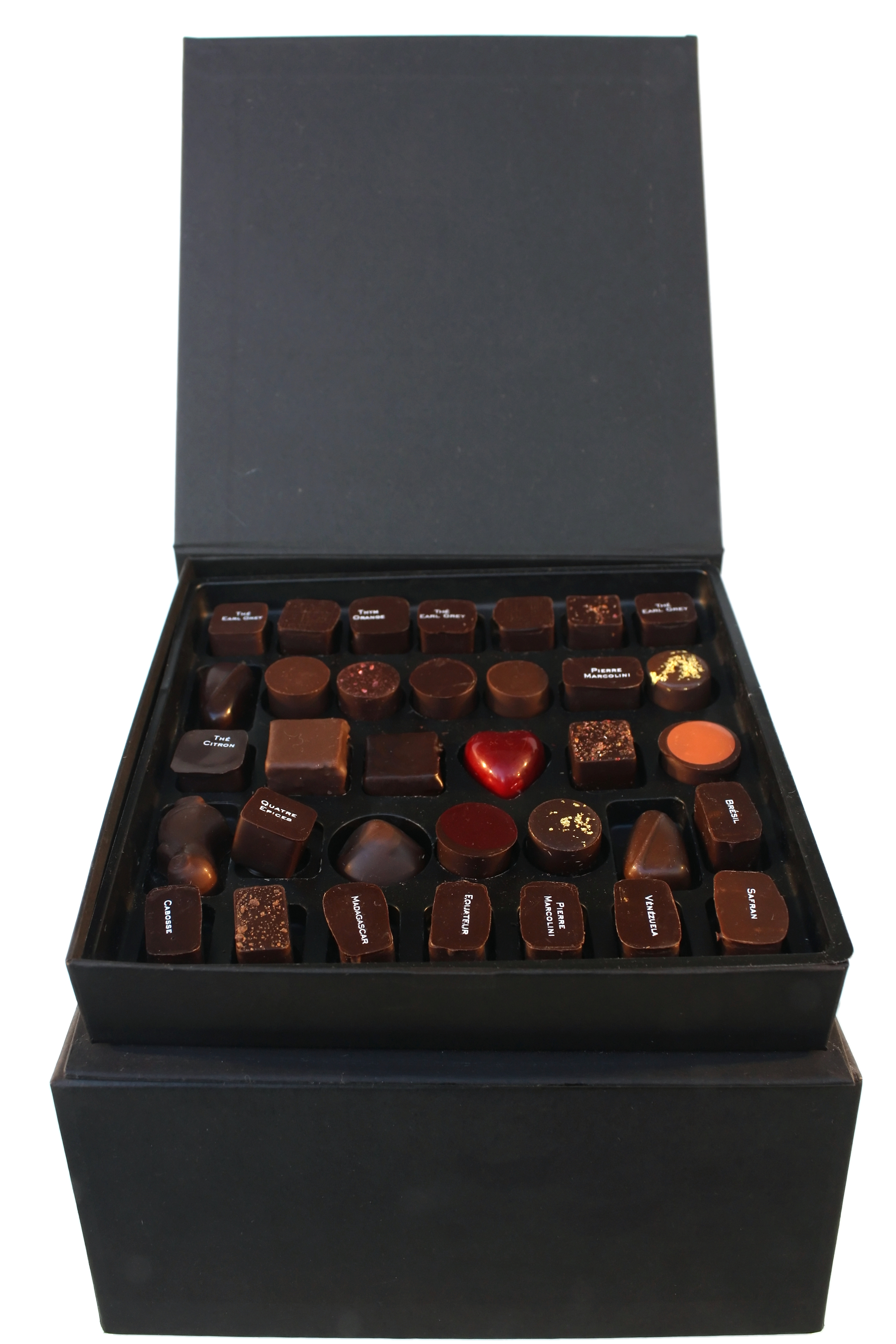 Boîte de chocolats exposée en vitrine d'un magasin Pierre Marcolini.